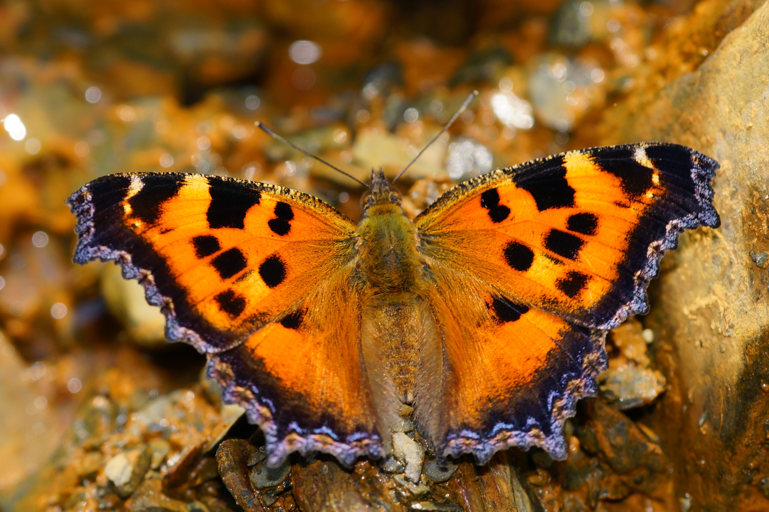 緋蛺蝶 Nymphalis xanthomelas formosana